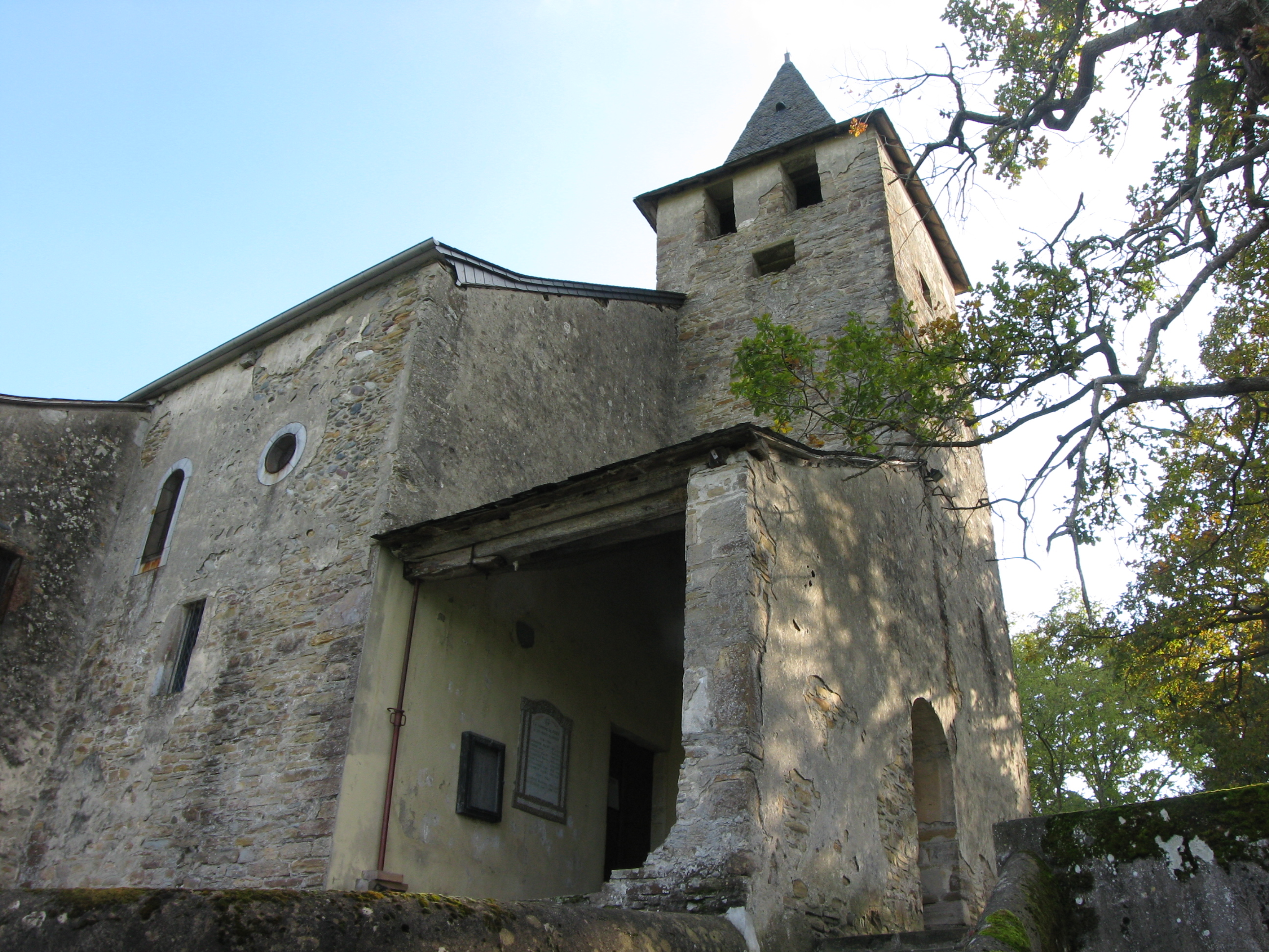 Vue de l'église de Poey-d'Oloron (Pyrénées Atlantiques) Pyrénées).